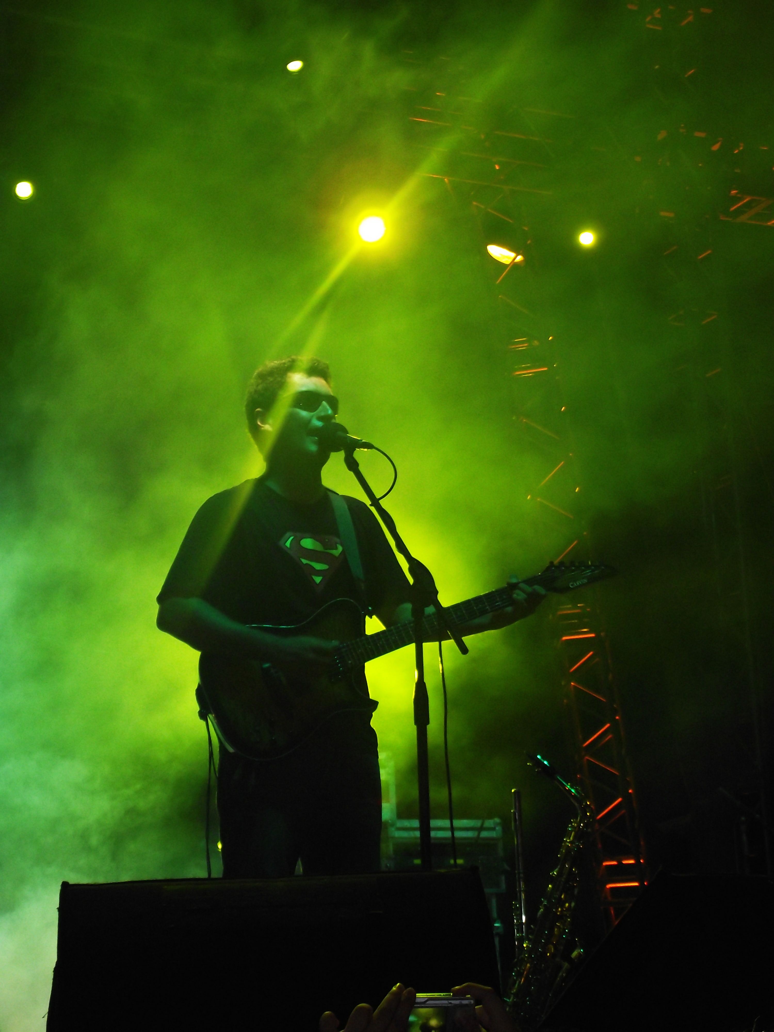 Sinan Kaynakçı, Pinhâni grubu ile Seferihisar'da sahnedeyken